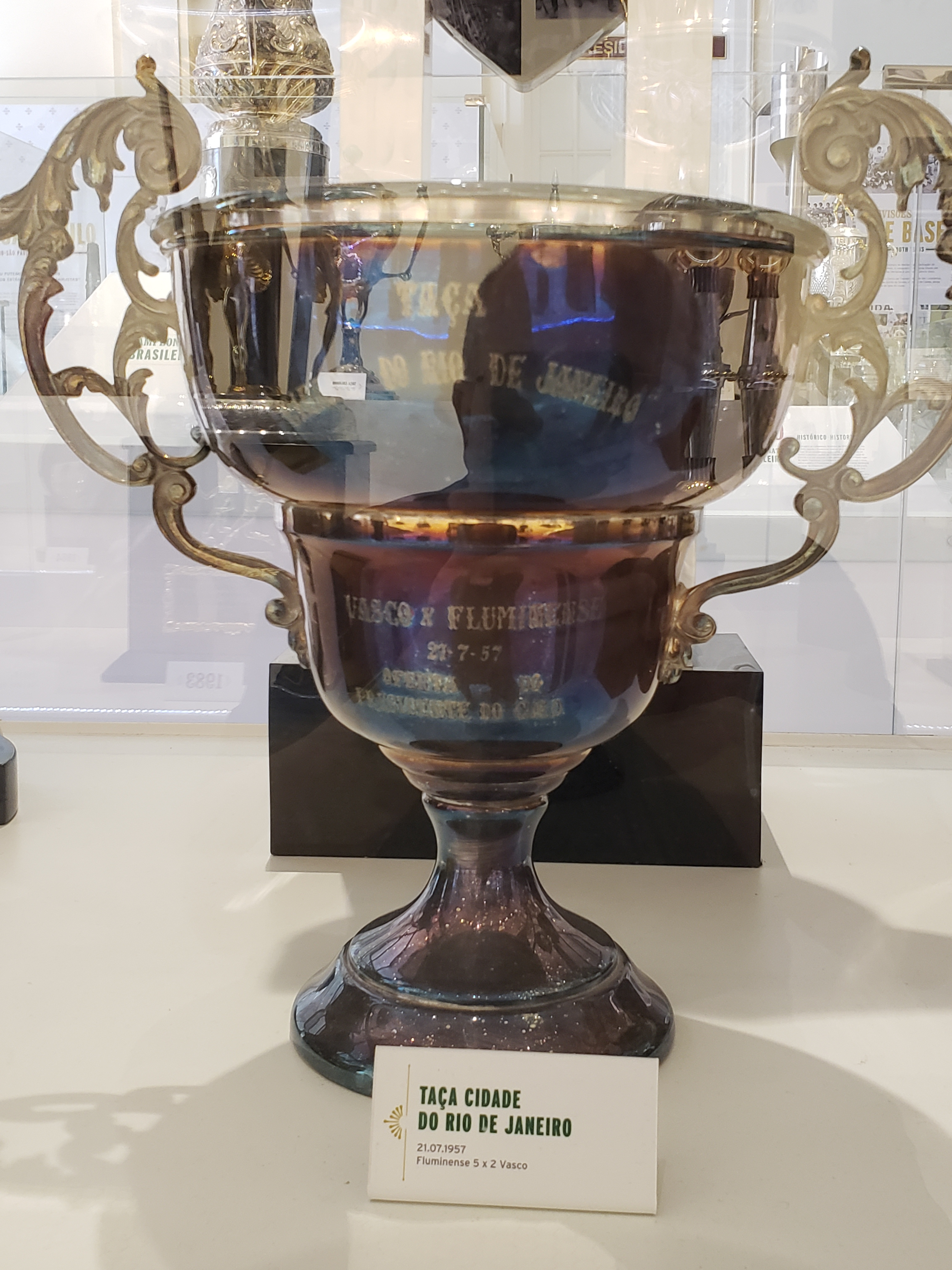 Taça Cidade do Rio de Janeiro de 1957 conquistada pelo Fluminense Football Club em 21/07, após vitória por 5 a 2 sobre o Vasco da Gama.